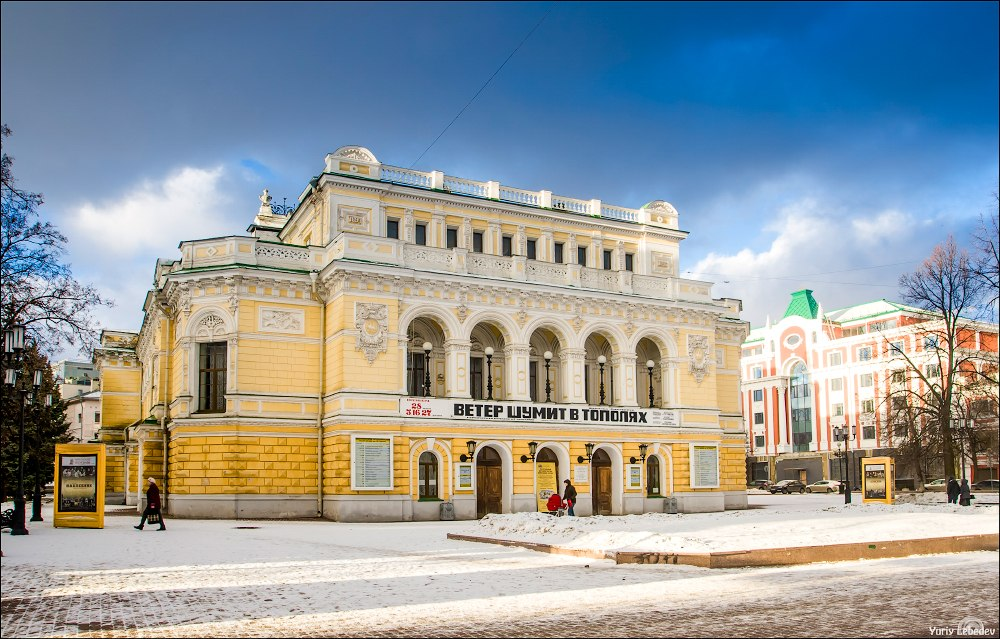 Нижегородский театр драмы зимой